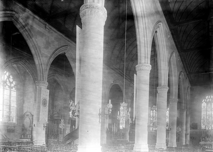 Eglise Saint-Ouen de Longpaon, vue diagonale de la nef, photographie en négatif par Enlart, Camille (historien).